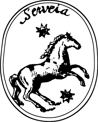 Герб "Севея" с государственной печати. 1699 год. Рисунок герба "Seweia" (Севея) в государственной печати. Из "Дневника путешествия в Московию австрийского дипломата И.Г.Корба", побывавшего в России в 1698 - 1699 гг.